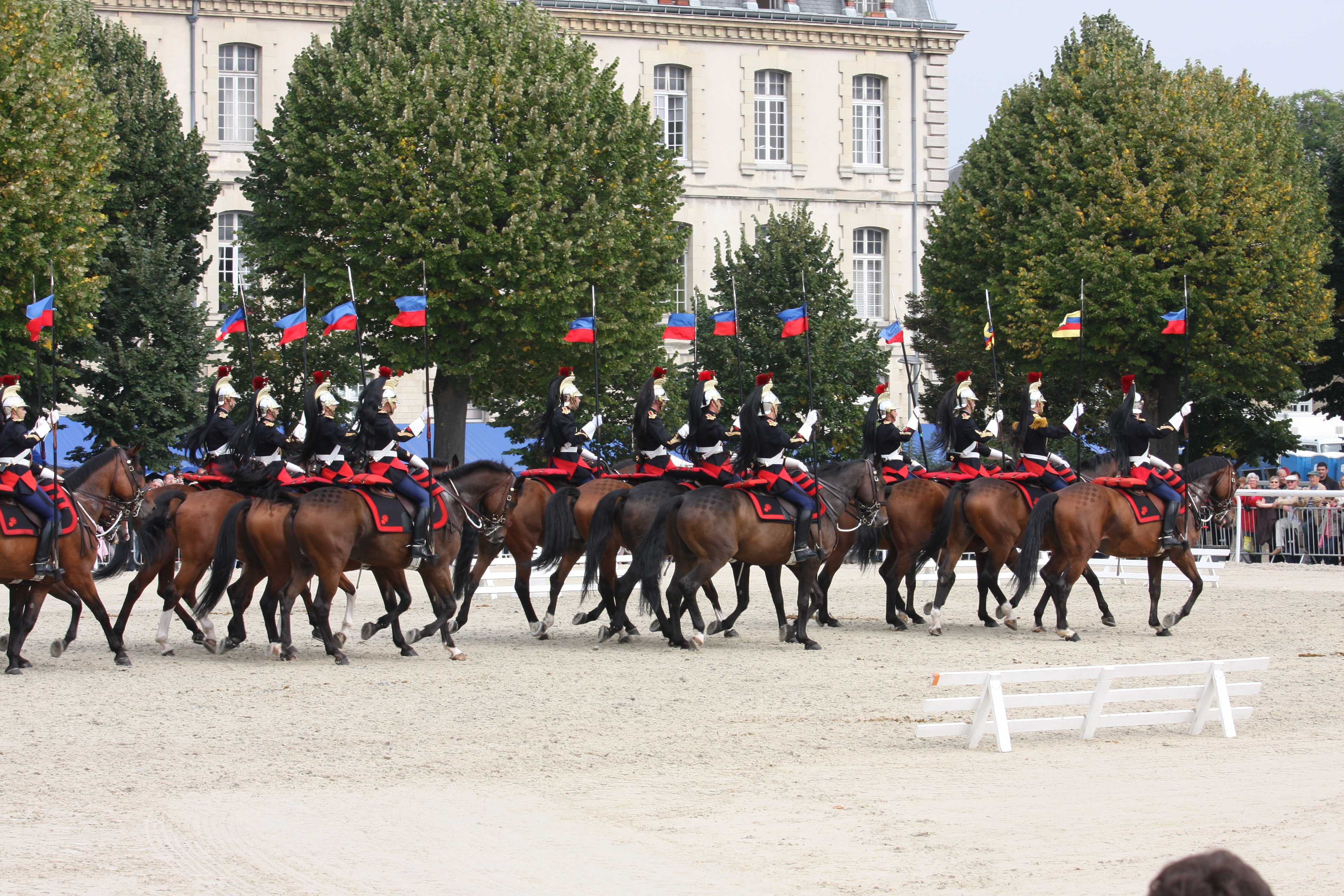 Carrousel des lances - Quartier Carnot - Septembre 2013